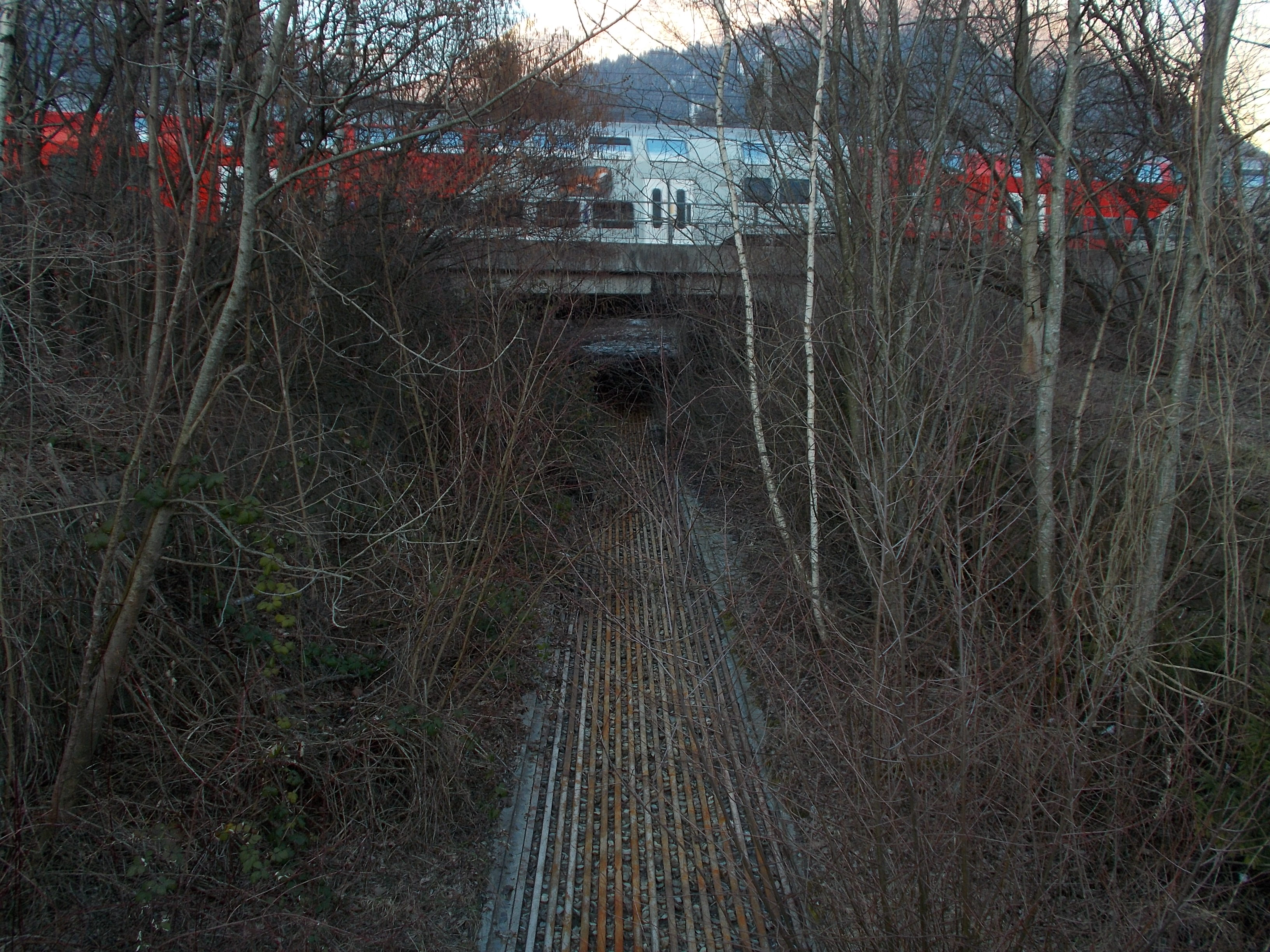 Mit Stahlschienen ausgekleideter Grund des Durchlasses unter dem ÖBB - Gelände